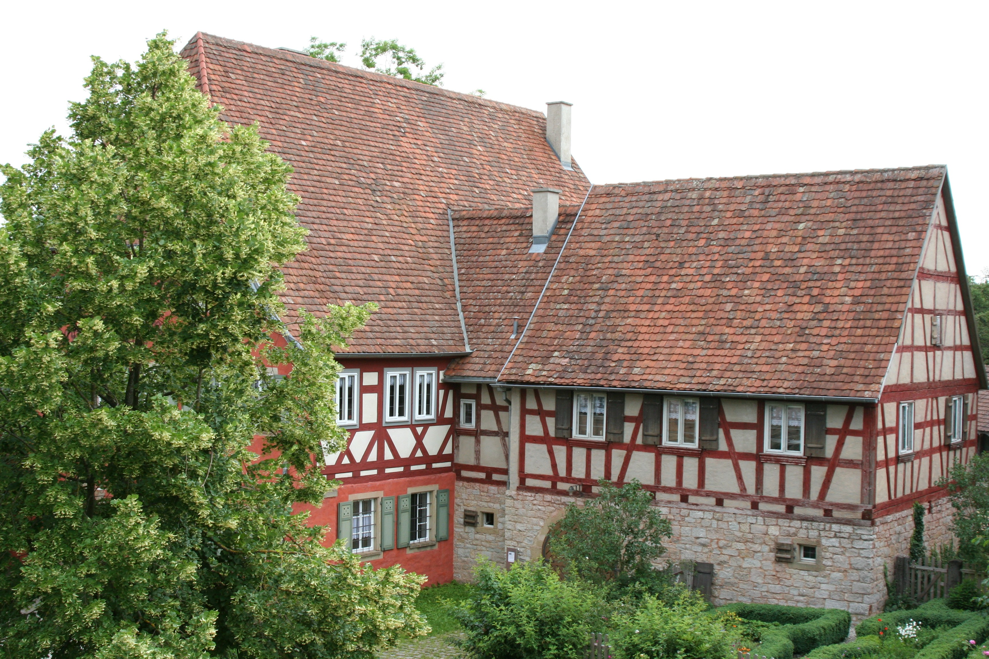 Gasthof Zum roten Ochsen aus Riedbach (links) mit dem angebauten Tanzhaus aus Oberscheffach (rechts) im Freilandmuseum Wackershofen